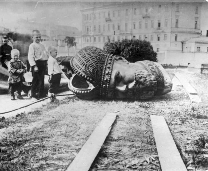 Фотография свержения памятника императору Александру III в Москве